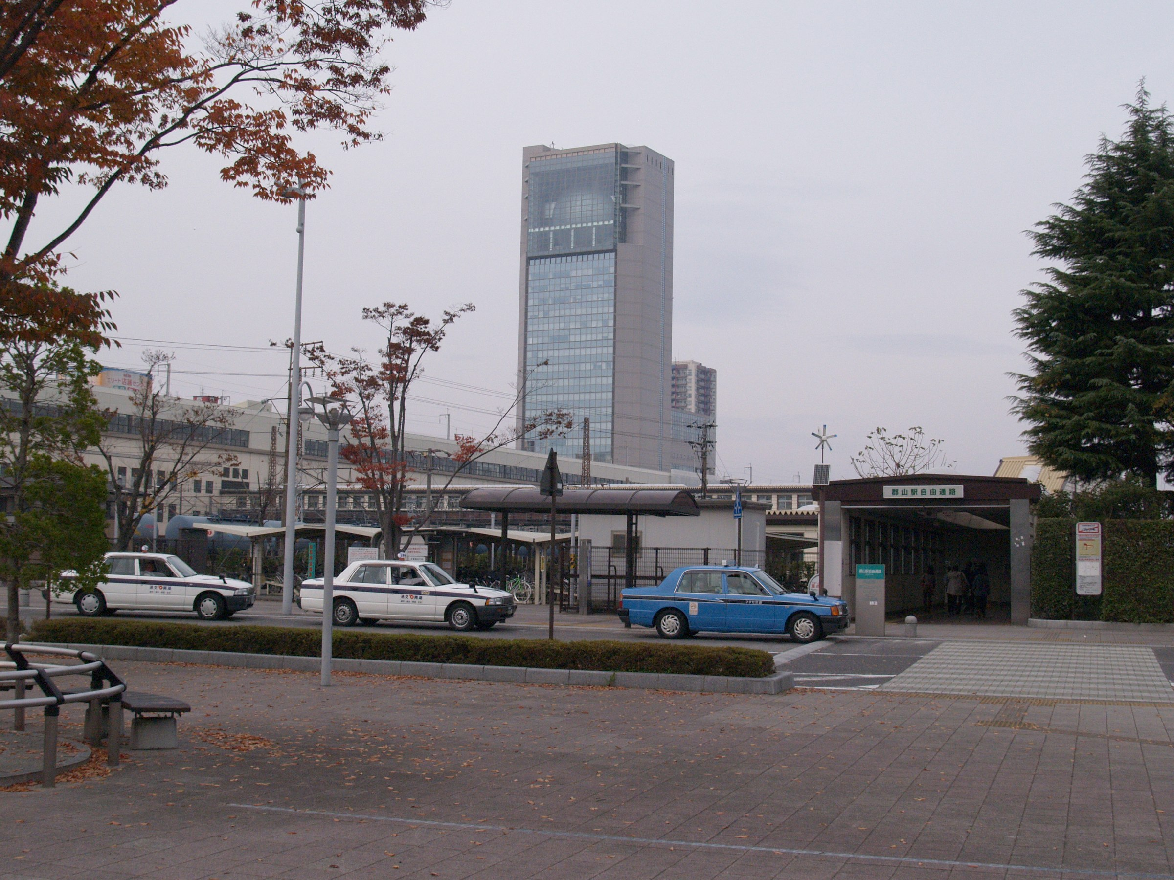 郡山駅 (福島県)東口